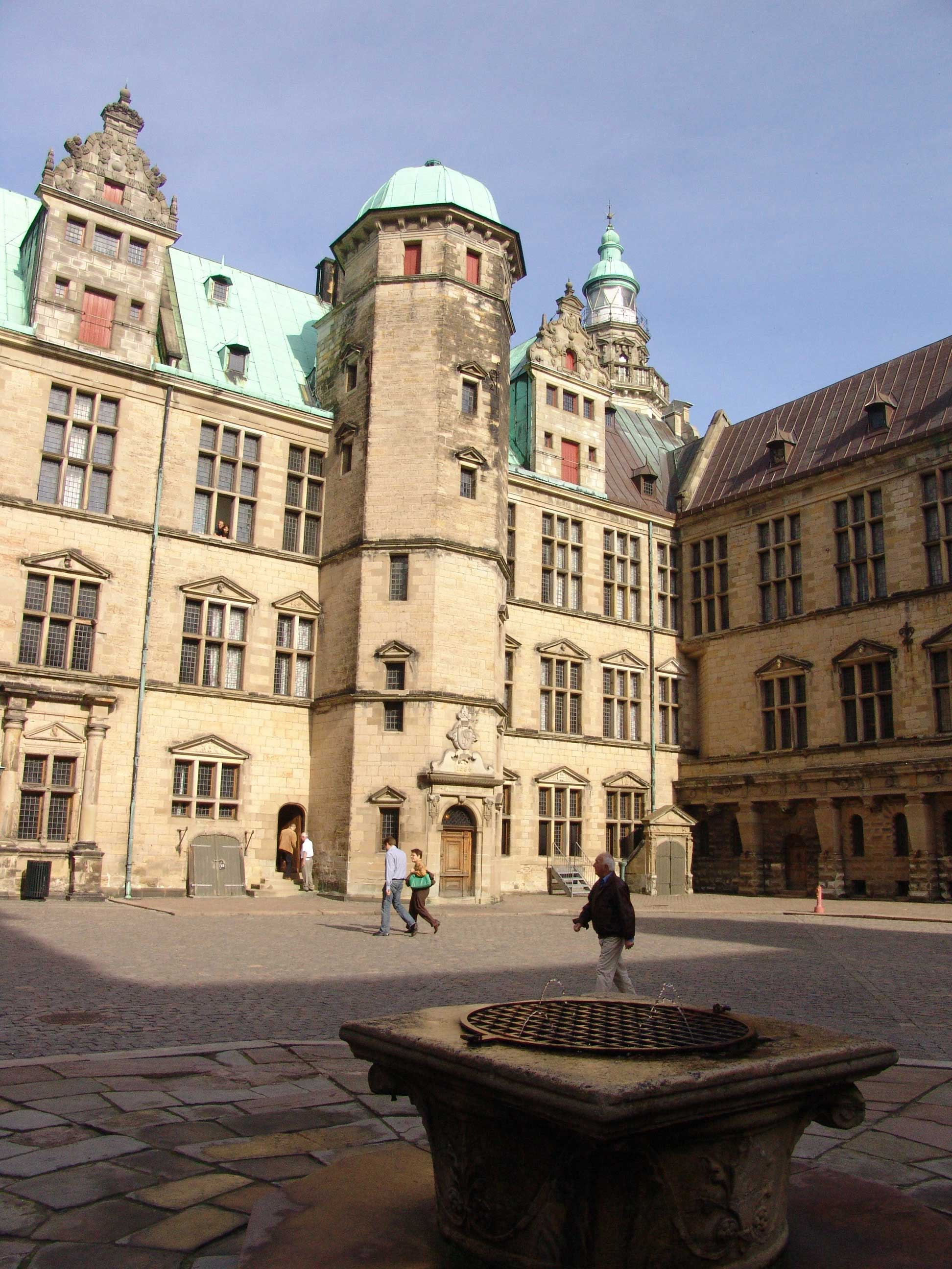 Kronborg Innenhof